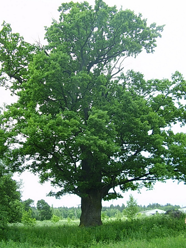 Вялікія Круговічы. Дуб-патрыярх